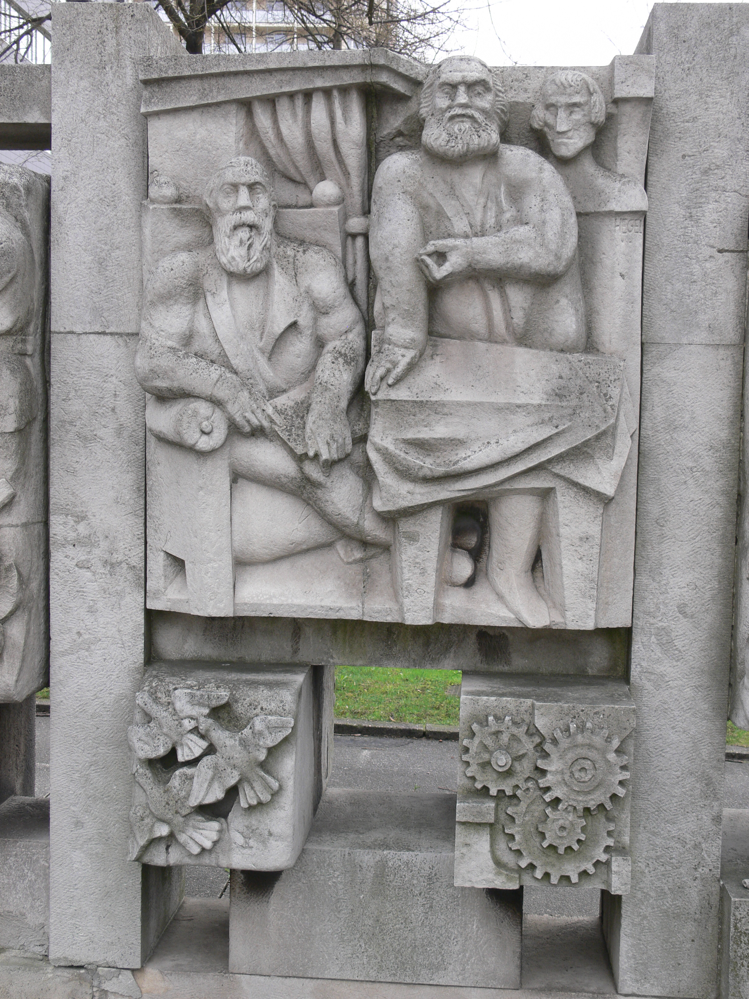 Joachim Jastram: Relief „Lob der Dialektik“, Teil der Lobgedichte nach Bertolt Brecht, vierteilige Skulptur (1972) an der Brückenstraße in Chemnitz, Skulpturen nach Brechts fünf Lobgedichten (nach Entwürfen von Joachim Jastram).